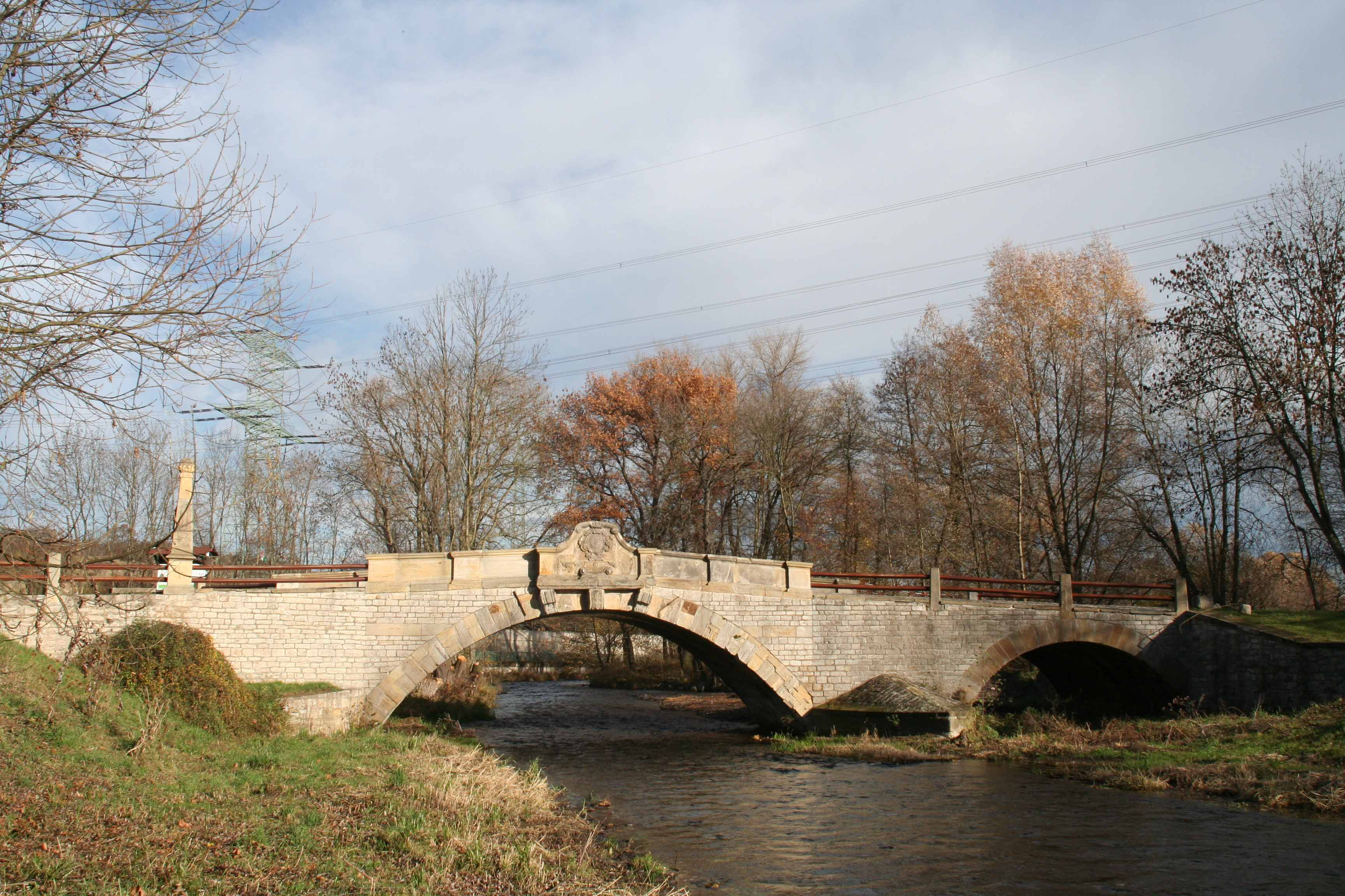 Marienthalbrücke über die Apfelstädt bei Ingersleben